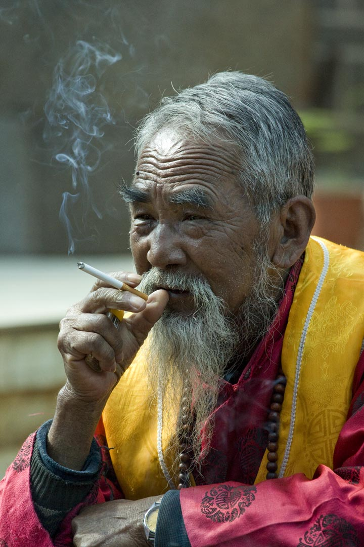 China